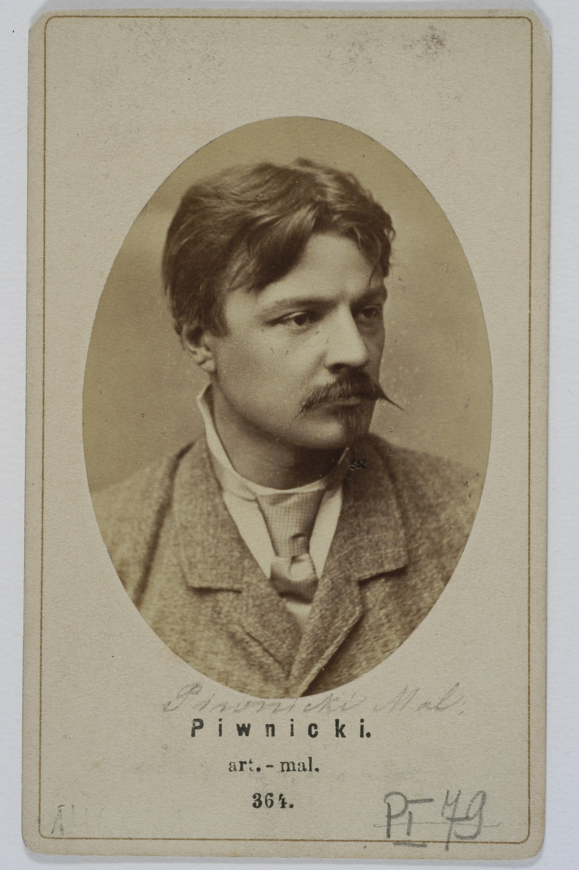 Witold Piwnicki, 1882 r.